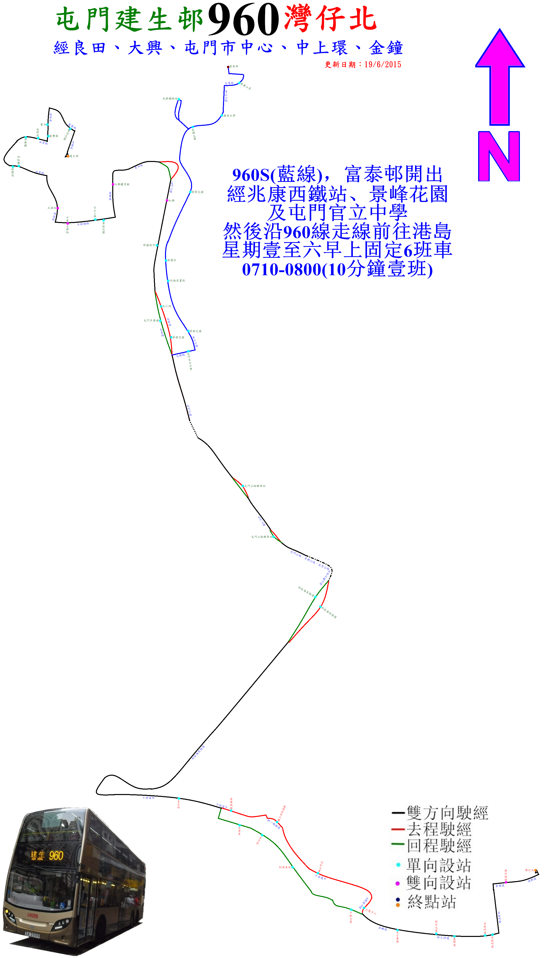 中文（香港）: 過海隧巴960線走線圖